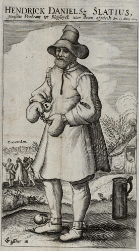 Remonstrants predikant Hendrick Danielsz Slatius, medepleger moordaanslag op prins Maurits